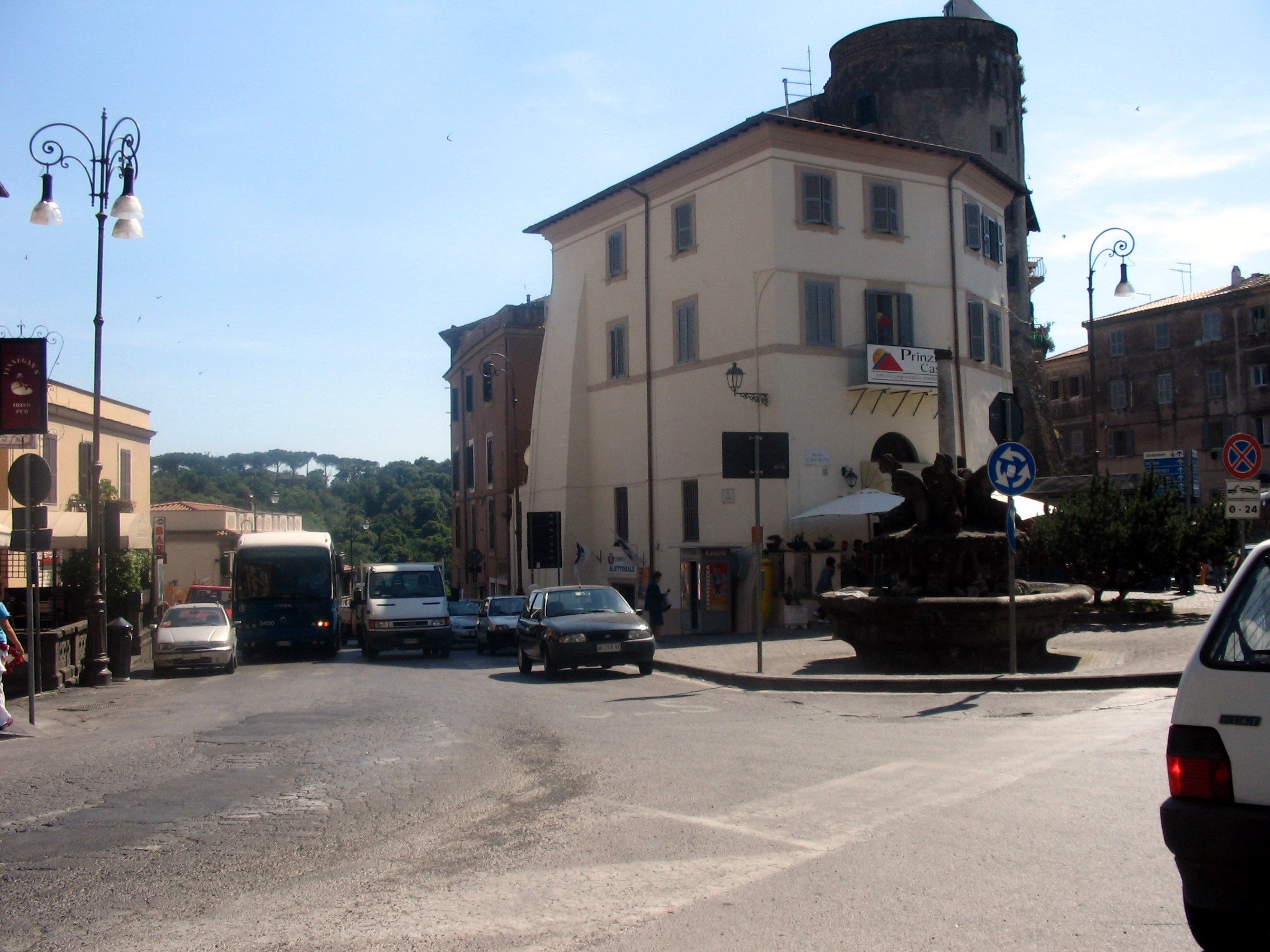 Marino, Lazio, Italia